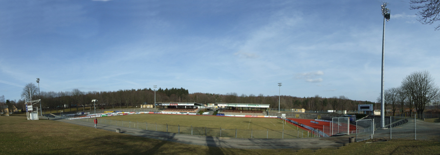 Panorama des Vogtlandstadions in Plauen, der Heimspielstätte des VFC Plauen.